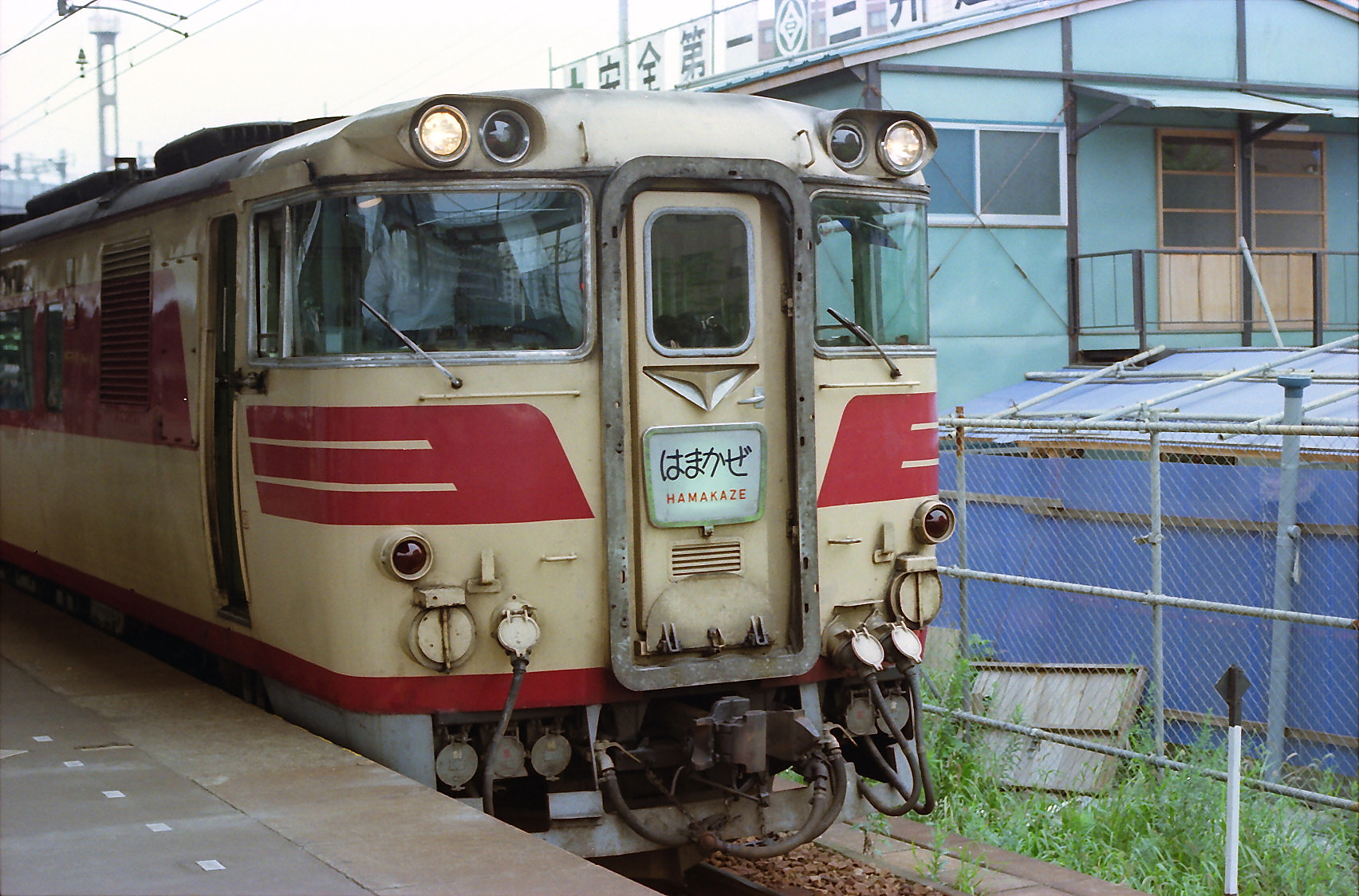 特急 はまかぜ 新大阪駅